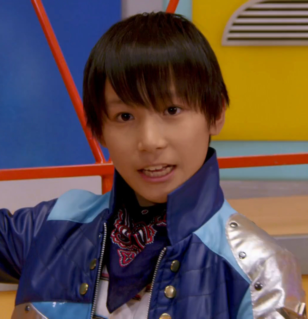 『宇宙戦隊キュウレンジャー 変身講座』スペシャルエピソード